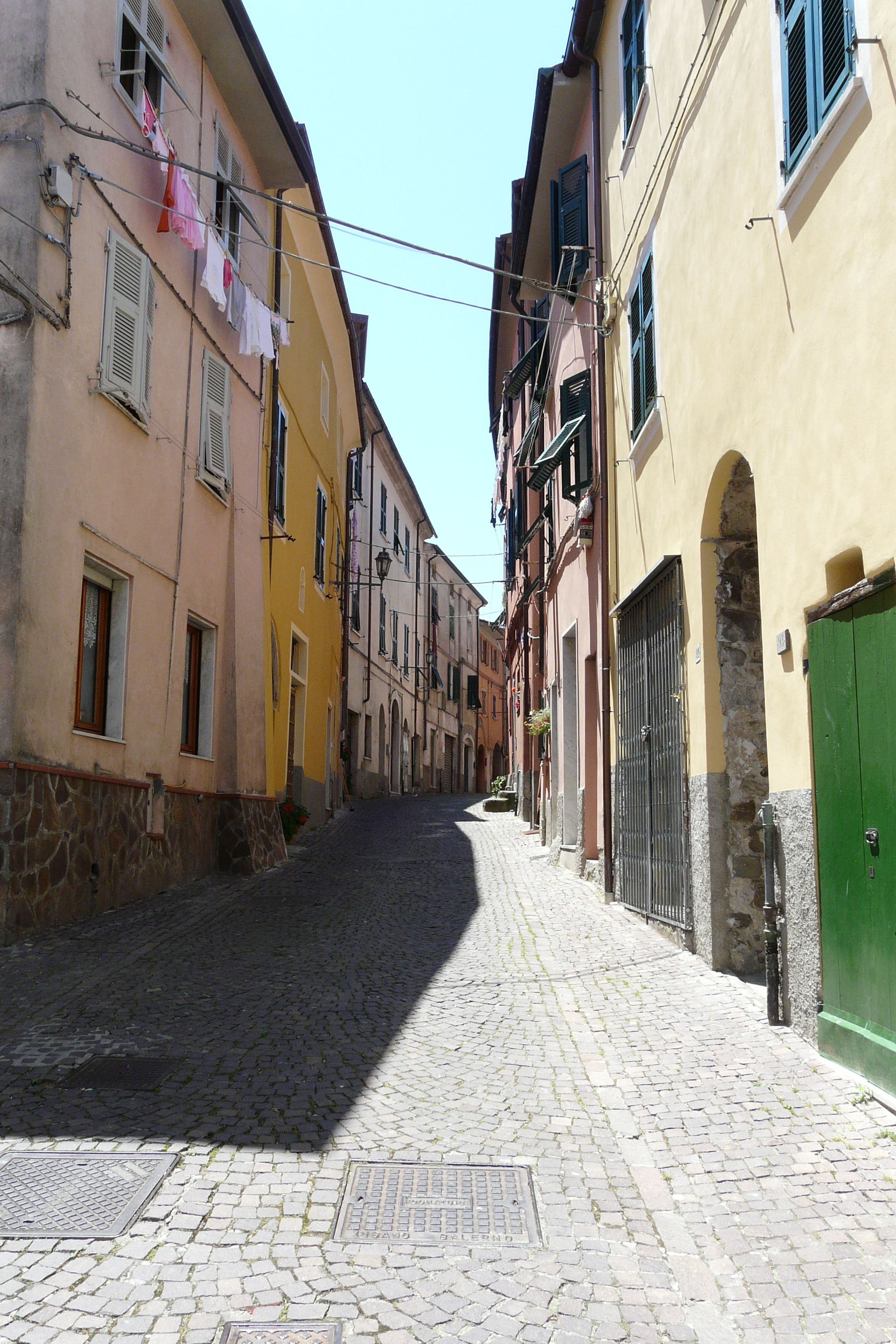 Centro storico di Santo Stefano di Magra, Liguria, Italia